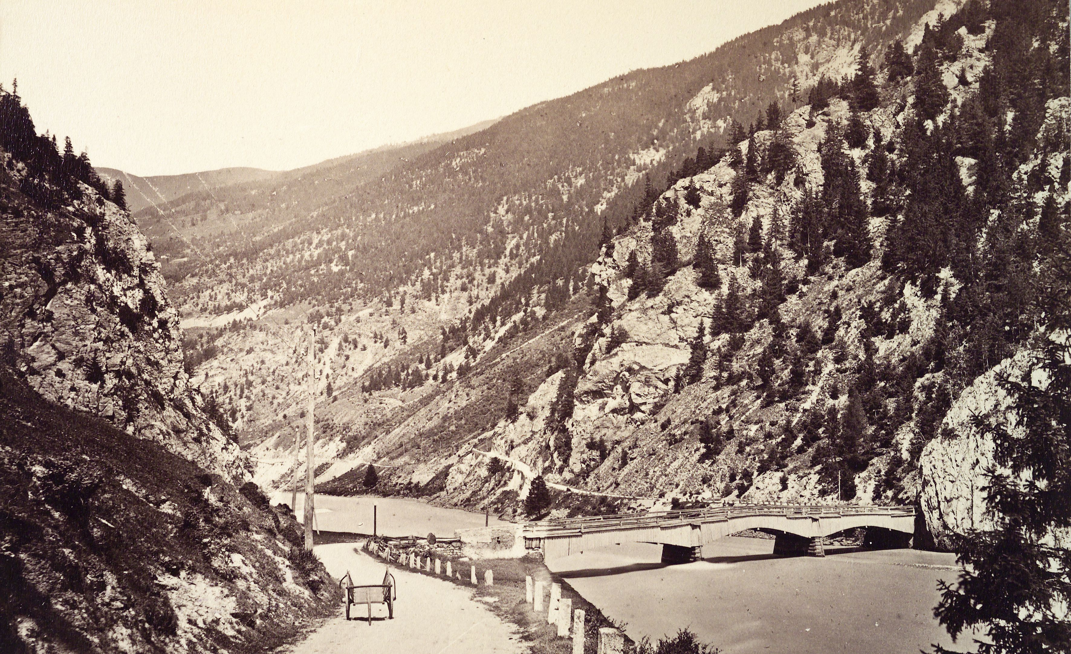 Pontlatzer Brücke um 1890. Fotografie : Albumin-Abzug, auf Karton montiert